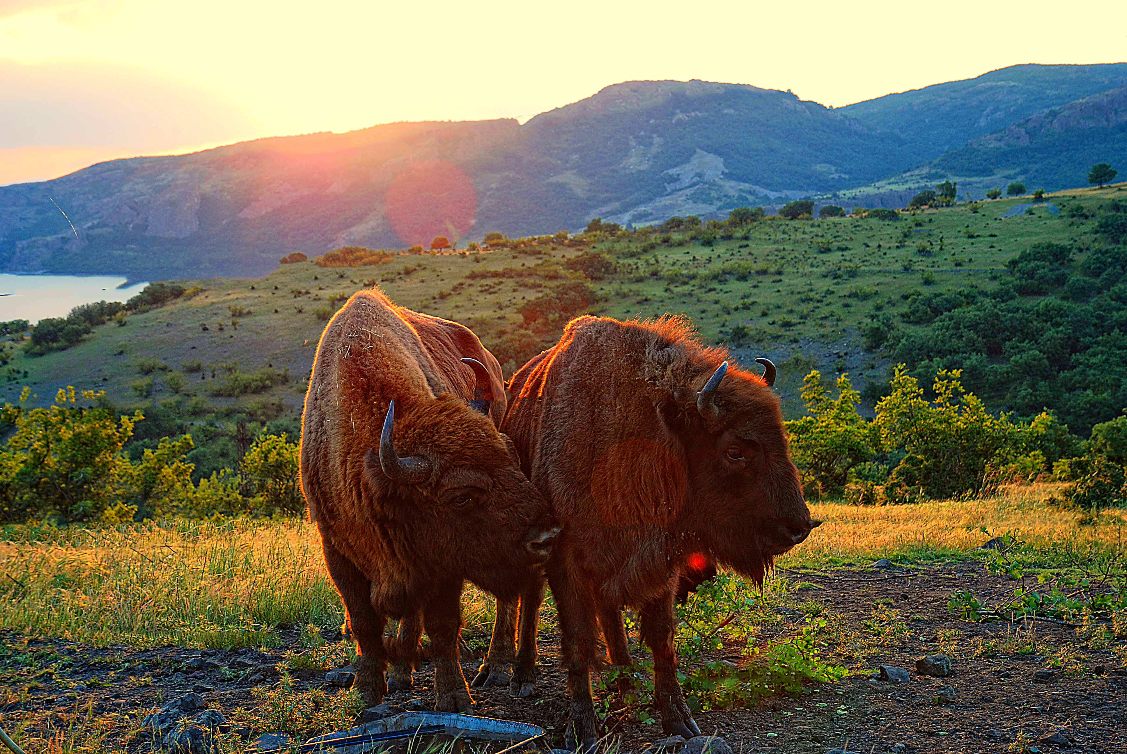 Вълчи дол